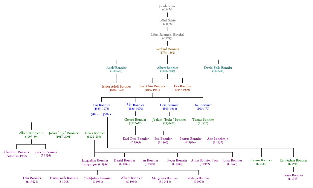 Släktträd över släkten Bonnier baserad på information i Wikipedia samt på allmänna uppgifter publicerade i media eller på Internet i övrigt.